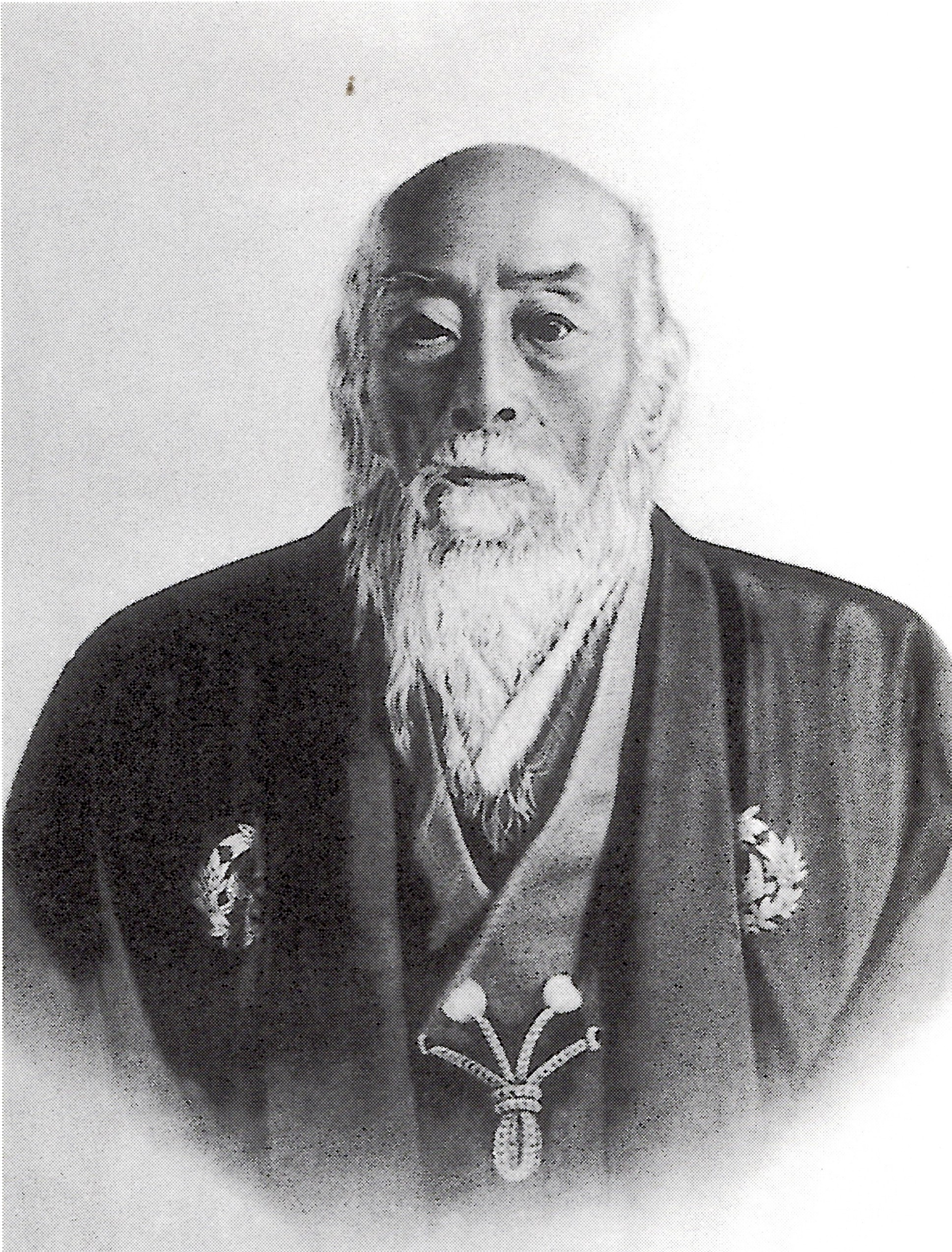 伊達宗紀の肖像。